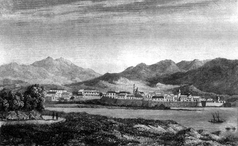 Image en provenance du livre : Eusèbe Girault de Saint-Fargeau, Guide pittoresque du voyageur en France, contenant la statistique et la description complète des quatre-vingt-six départements, orné de 740 vignettes et portraits gravés sur acier, de quatre-vingt-six cartes de départements et d'une grande carte routière de la France, par une Société de gens de lettres, de géographes et d'artistes, Paris, F. Didot frères, 1838, 6 volumes in-8° (BNF : 8-L25- 46). Volume III Didot frères, 1838. Route de Paris à Nice traversant les départements de l'Isère, des Hautes-Alpes, des Basses-Alpes et du Var. auteurs dessins : Rauch (ou autre) auteurs gravures : Skelton fils, Schroeder, Bishop (ou autre)